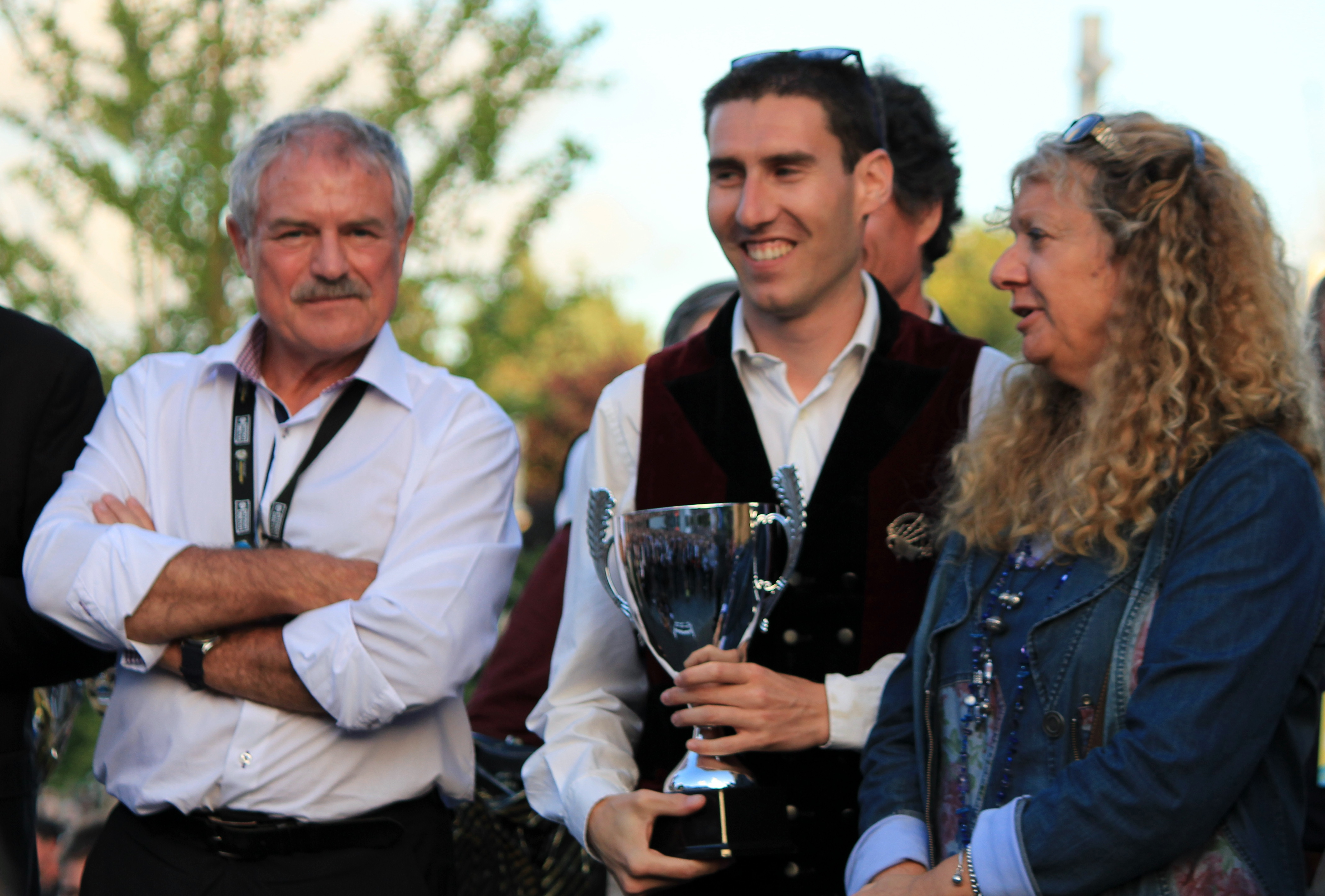 Annonce des résultats du championnat national des bagadoù 2013 dans le cadre du festival interceltique de Lorient : Bagad Roñsed-Mor